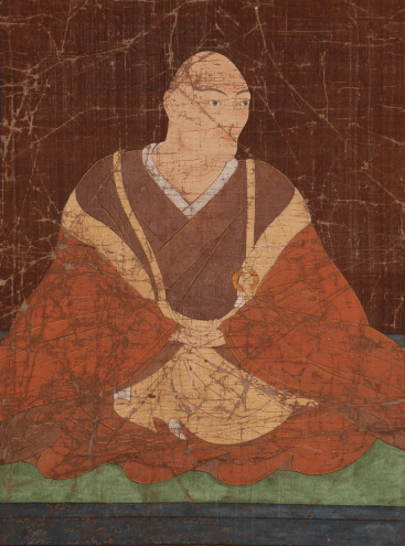 島津久豊像